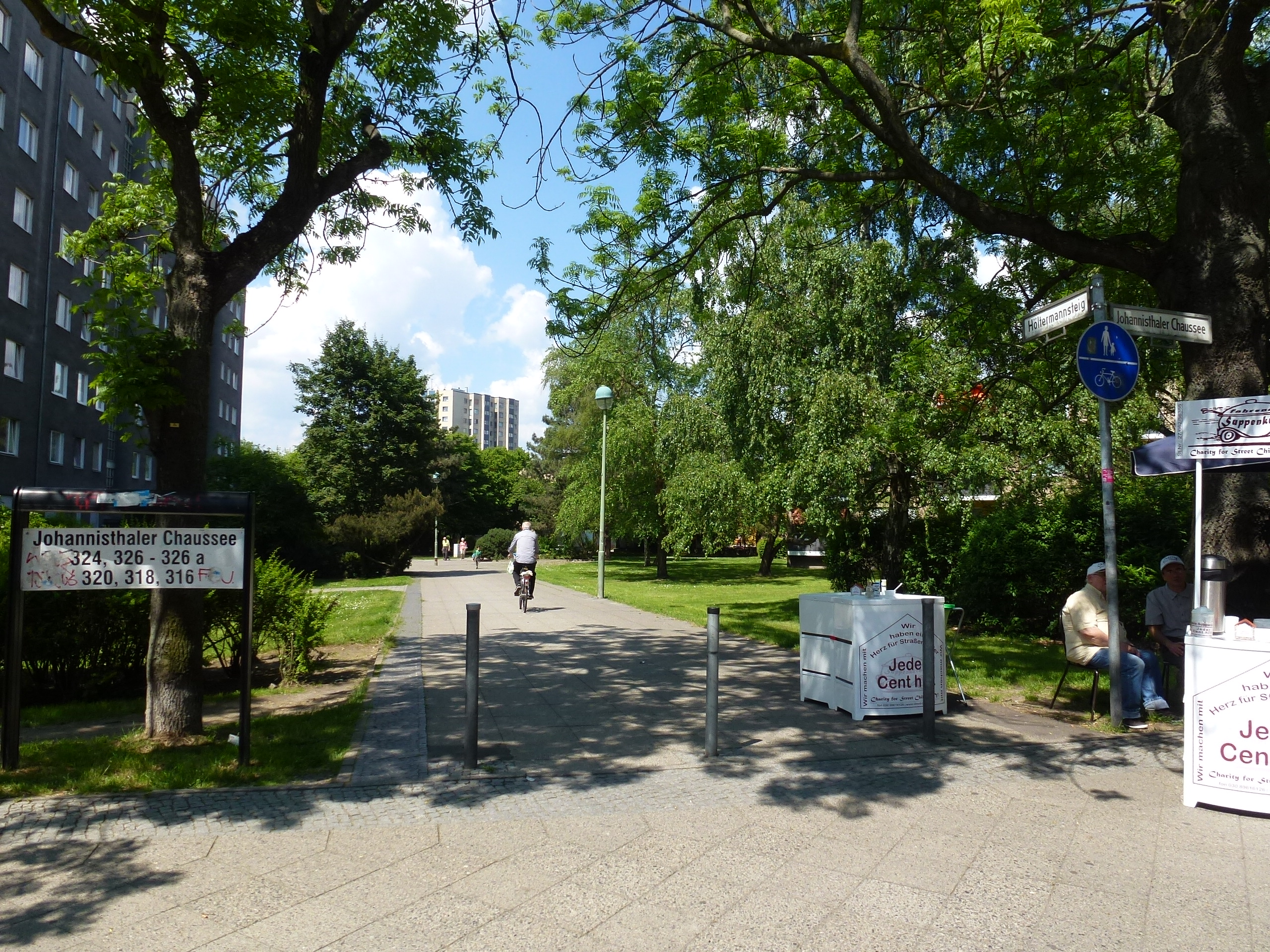 Berlin-Gropiusstadt Höltermannsteig